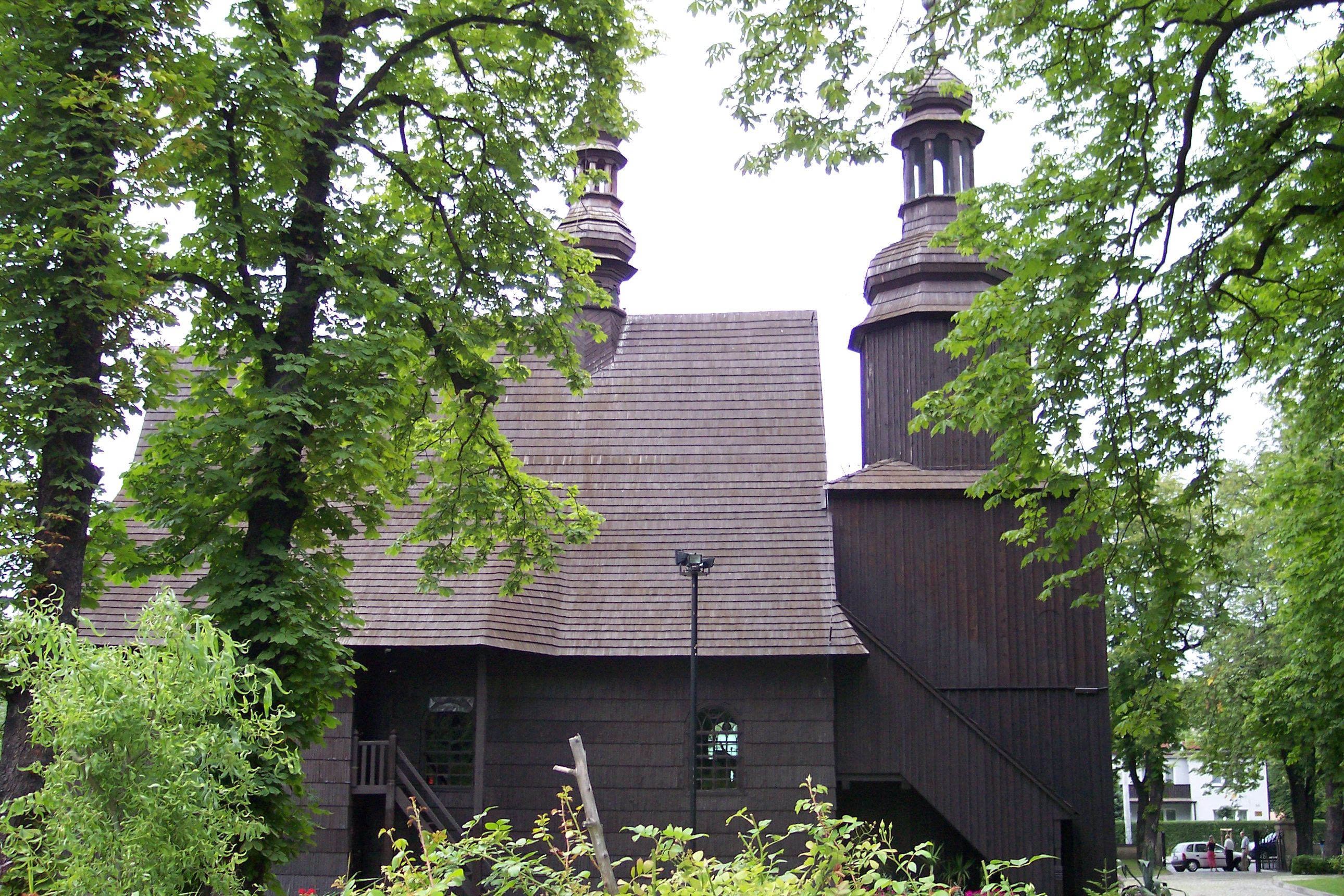 Kościół Wniebowzięcia Matki Boskiej w Gliwicach